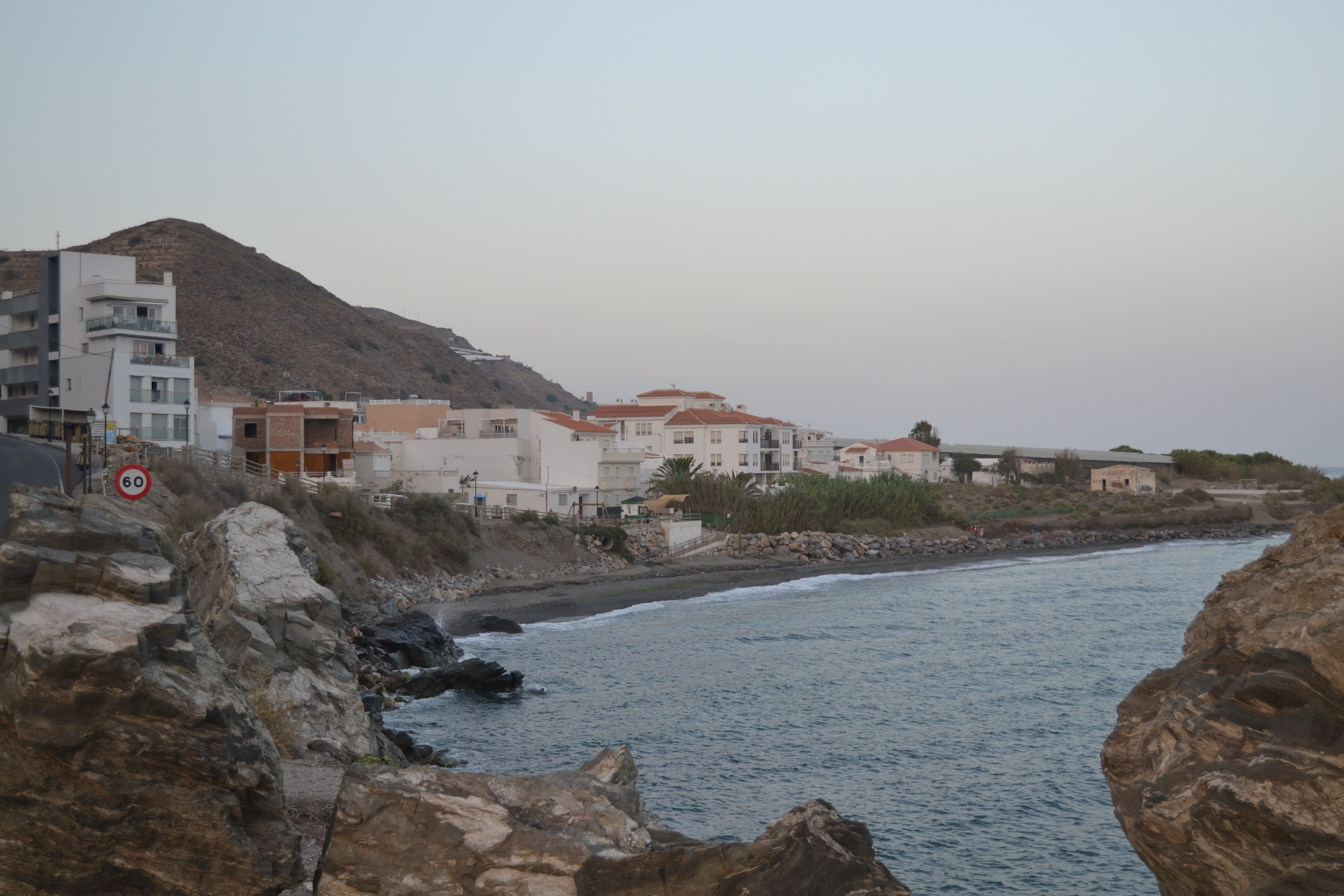 Localidad de Casarones, en el municipio de Rubite (Granada, España)